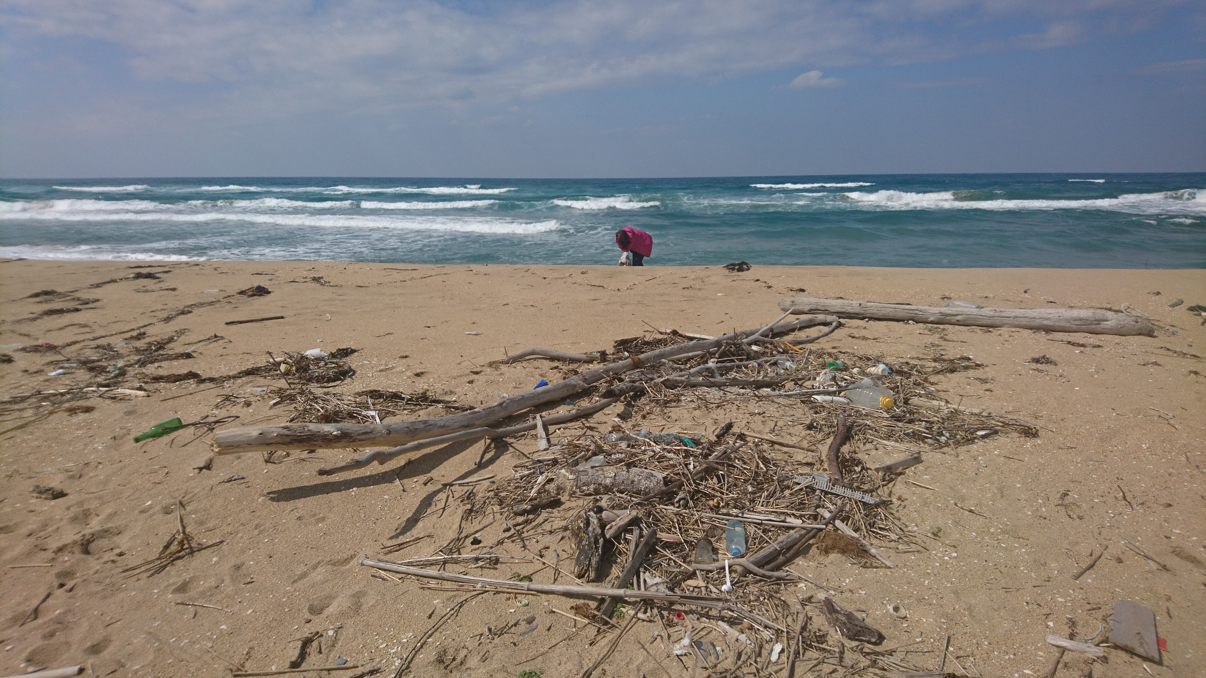 京丹後市浜詰海岸の漂着ゴミ